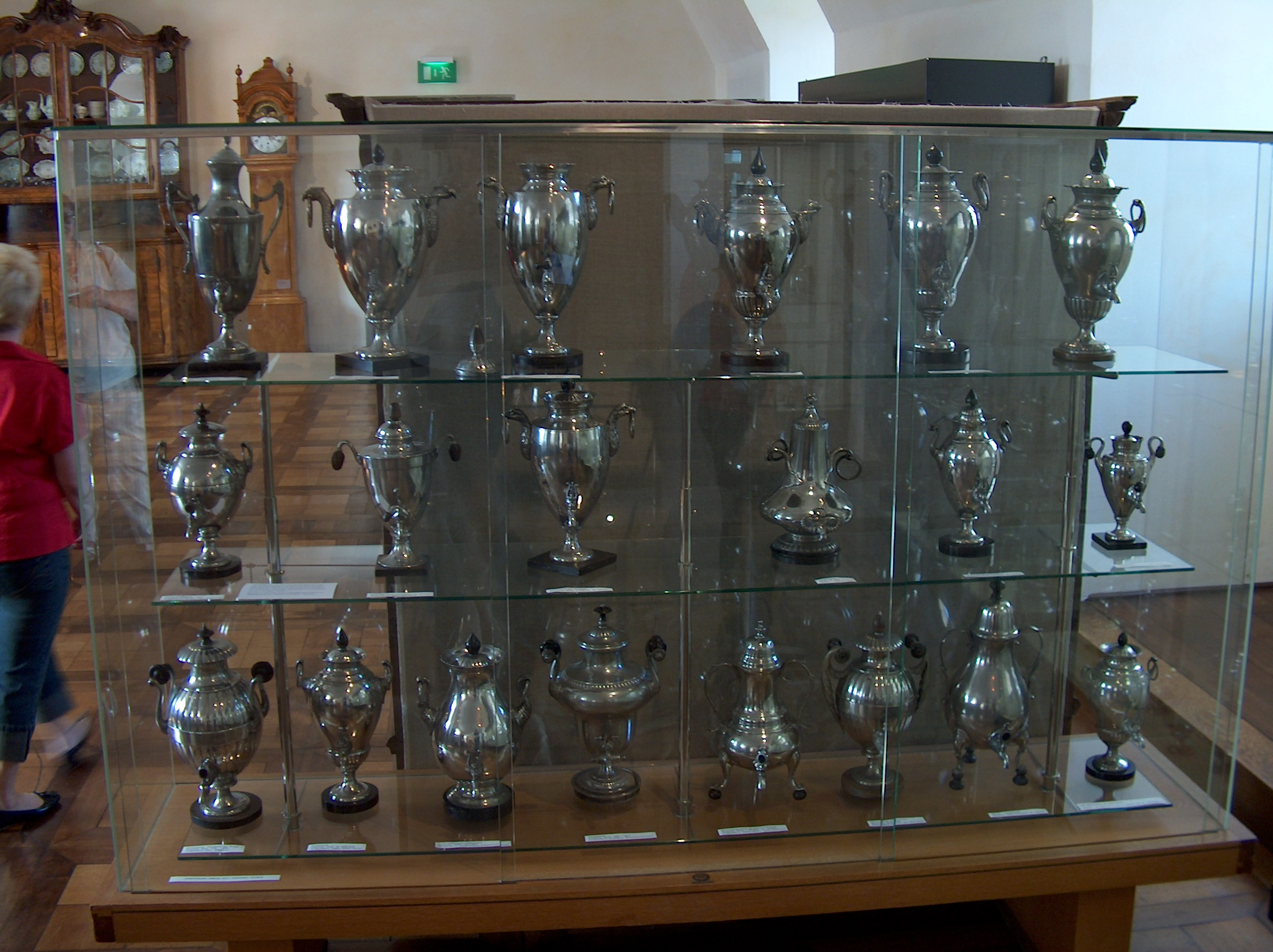 Dröpppelminnas im Bergischen Museum Schloss Burg